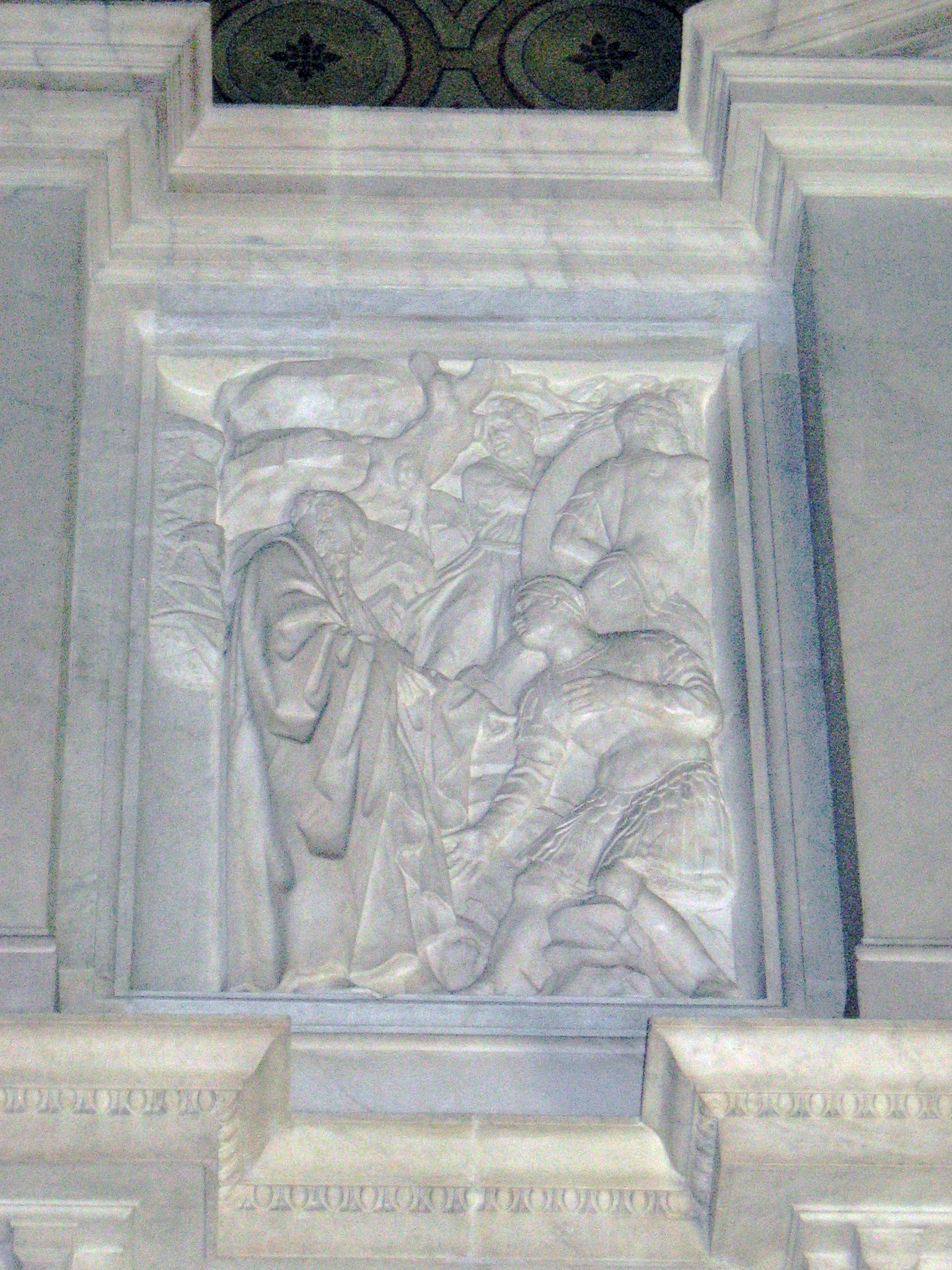 grafmonument Leo X, relief rechts